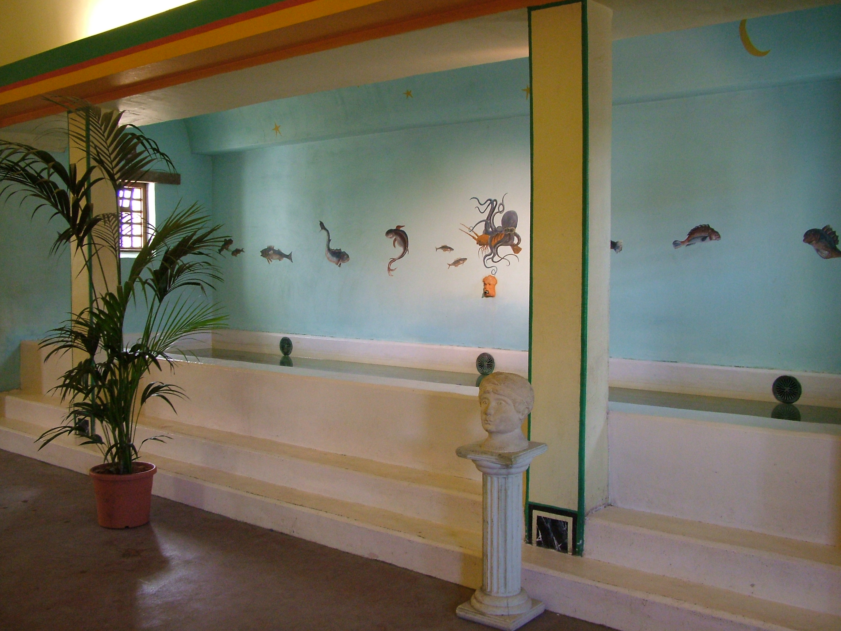 Archeon, badhuis